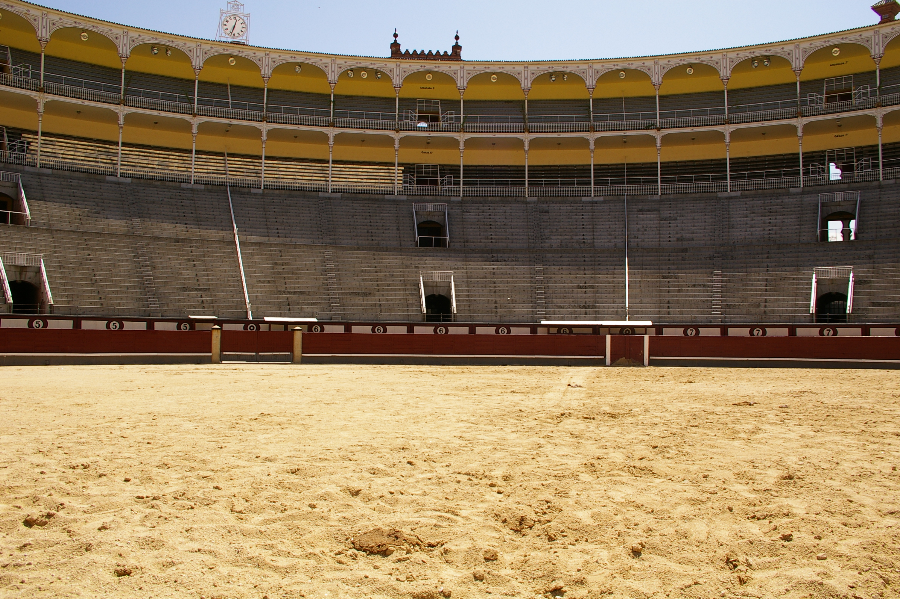 Albero de Las Ventas (Madrid)